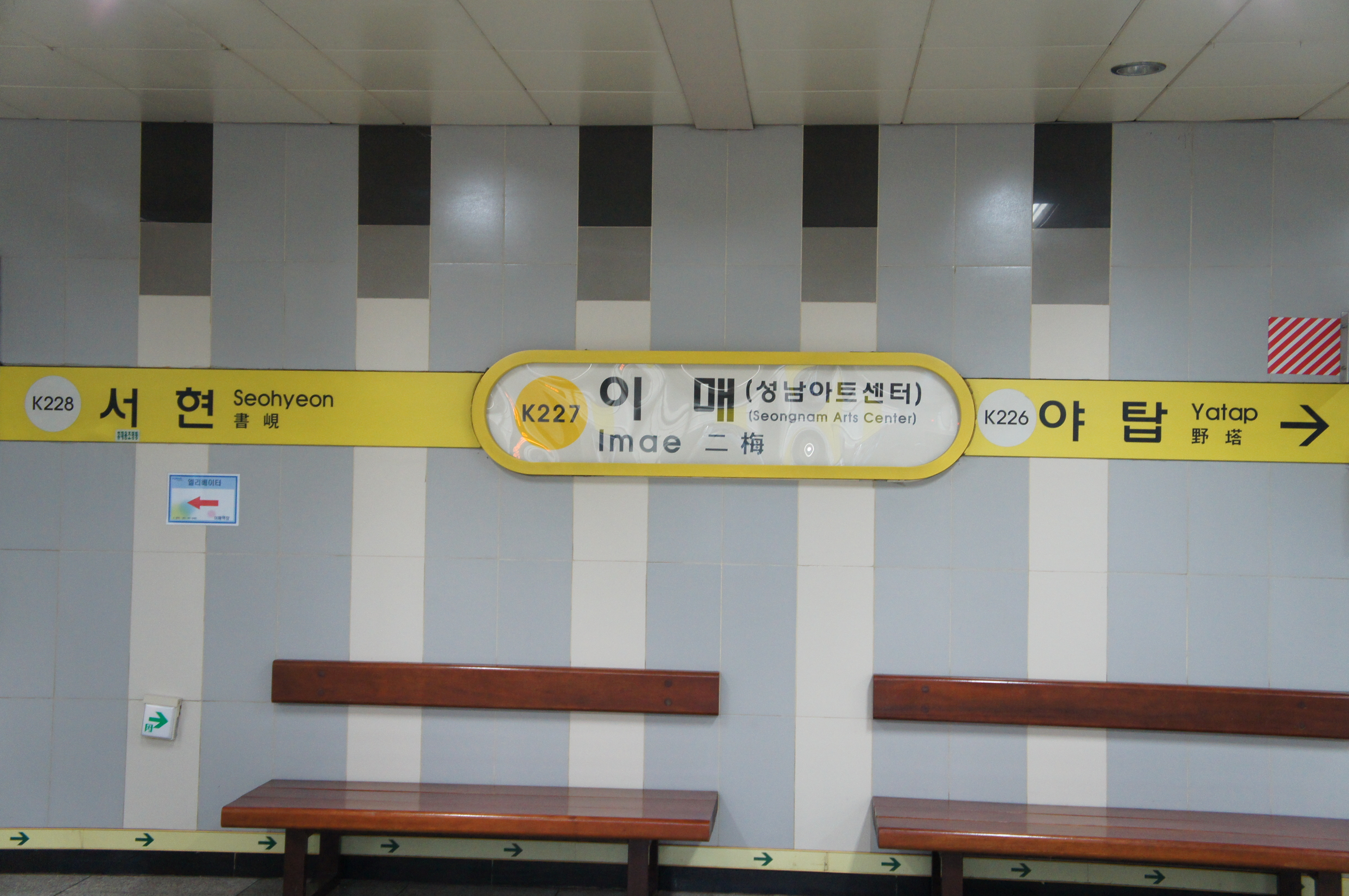 이매역 역명판